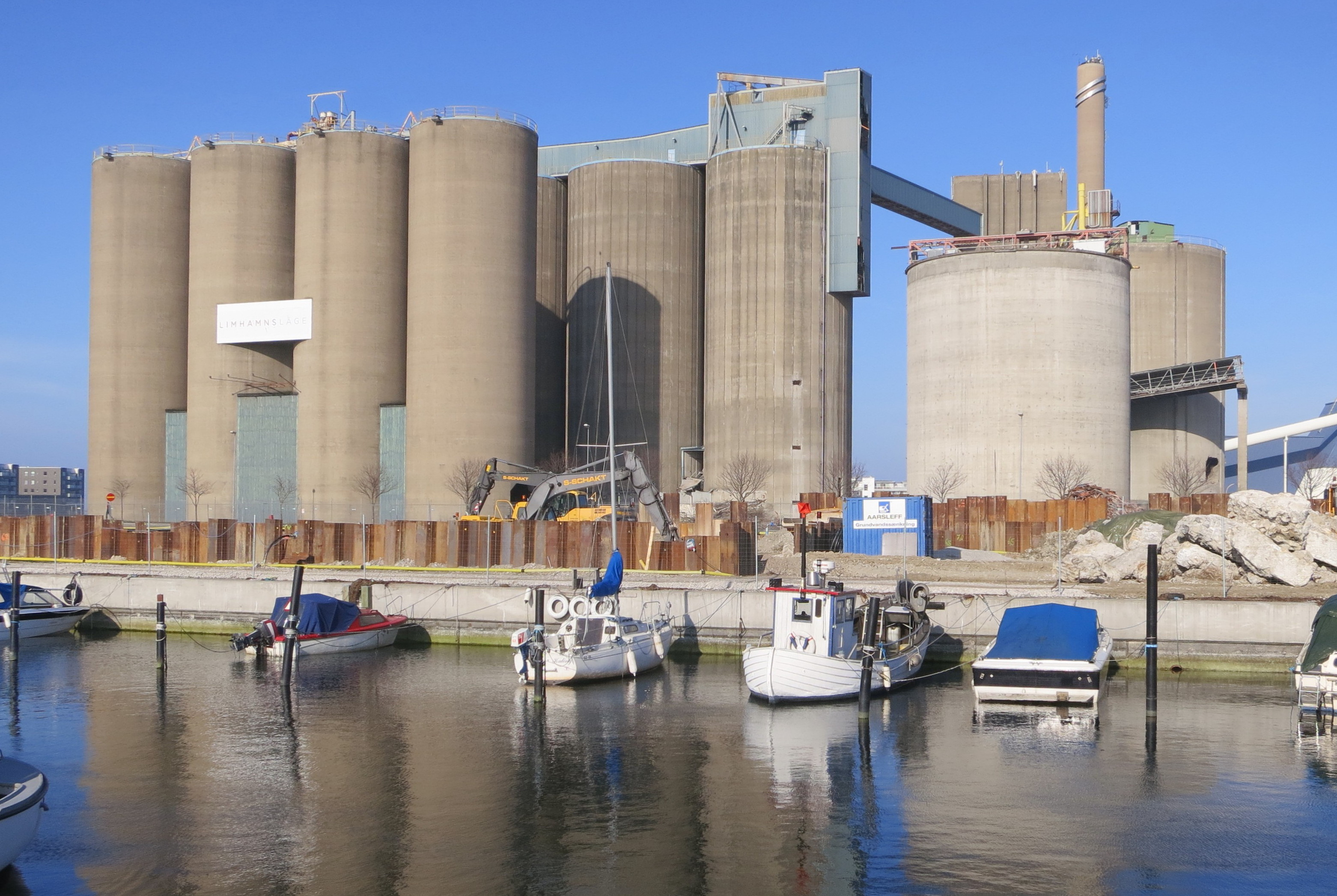 Limhamns cementfabrik i mars 2014